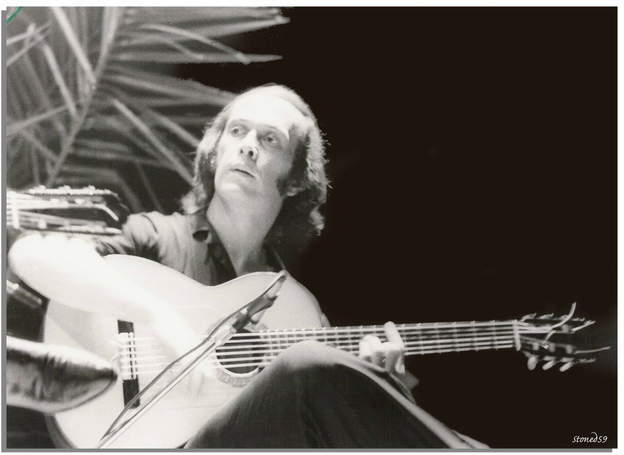 En concierto con Al Di Meola y John Mclaughlin. Photographer: F. Antolín Hernandez Cámara: Olympus OM2 Película: Tri X Pan (400 ASA) revelado: casero